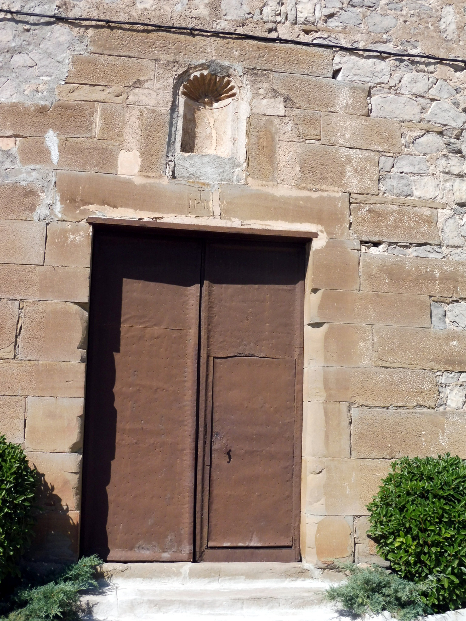 Església parroquial de Sant Pere de la Curullada (Granyanella): portada